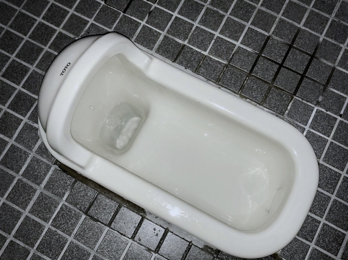 C75+Calmic